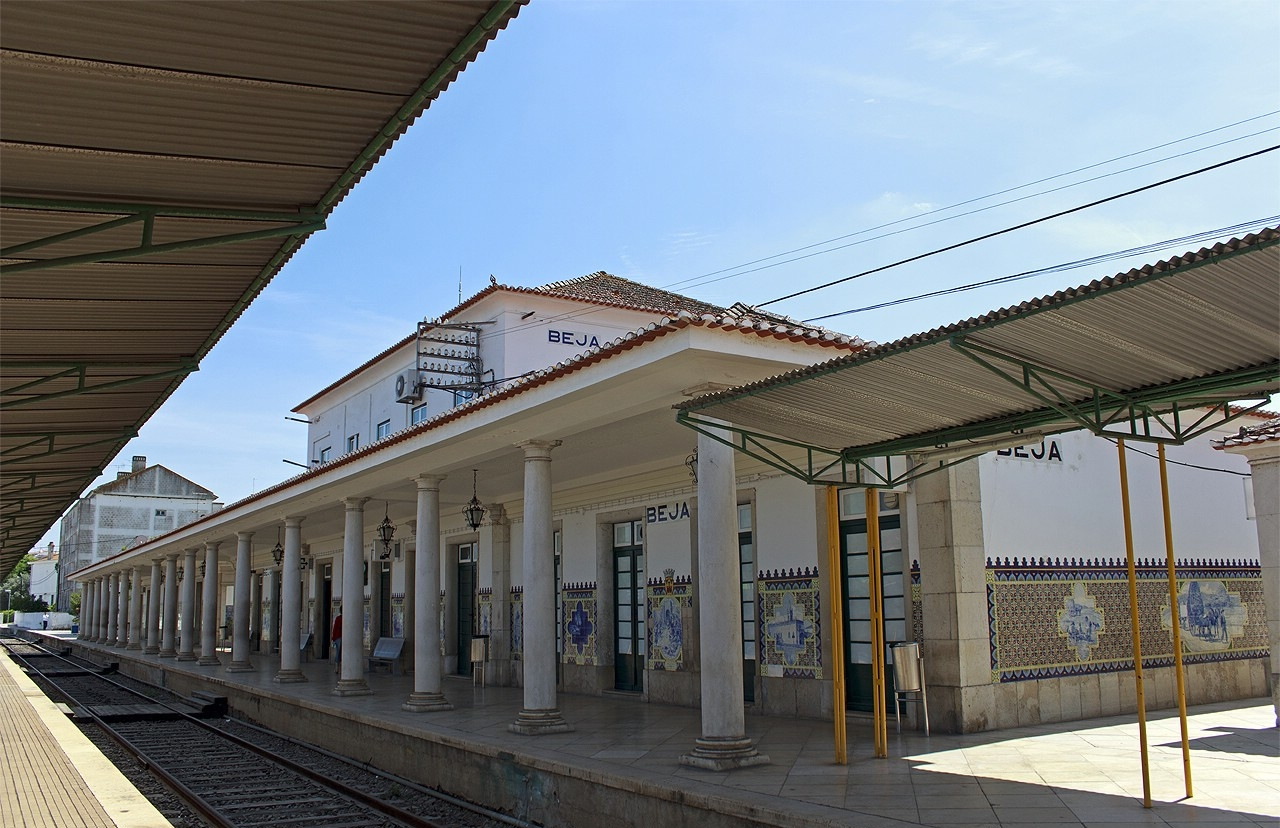 A estação de Beja, vista do lado da linha, "resignada" com a perda imenente do serviço ferroviário de Intercidades (que estava a uma semana da data desta foto)...